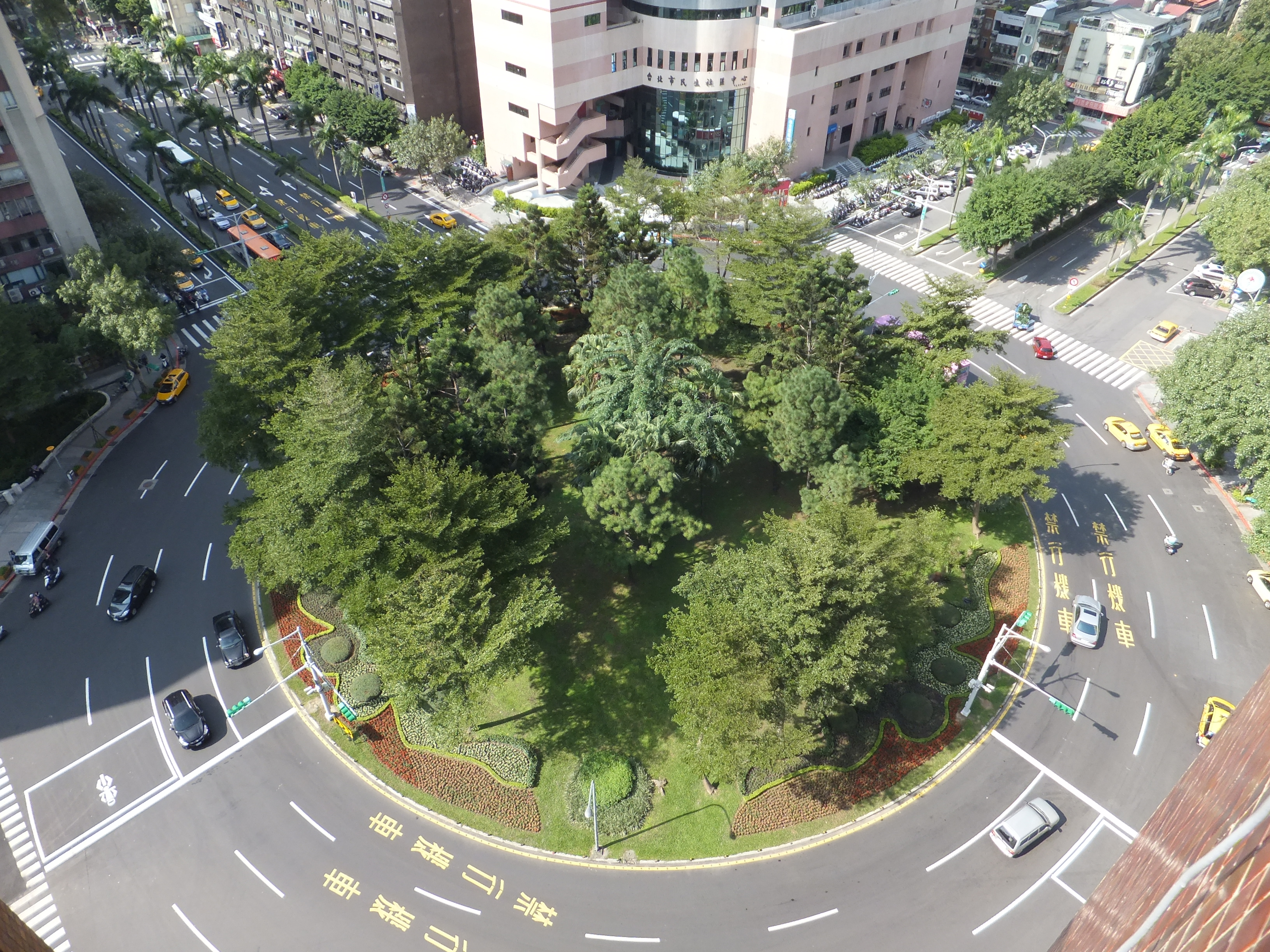 自東南方俯瞰民生圓環全景。